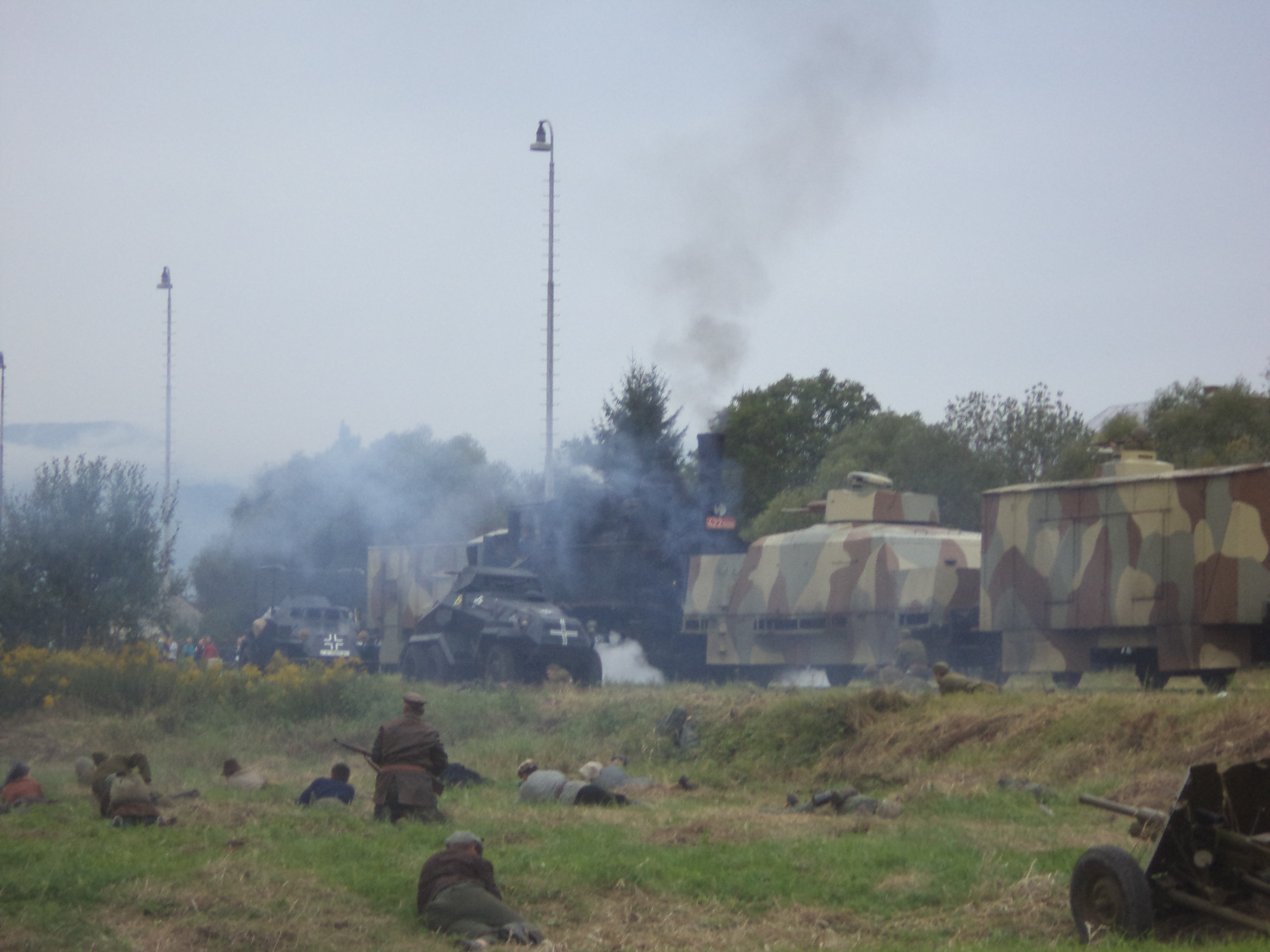 Pancierový vlak Štefánik